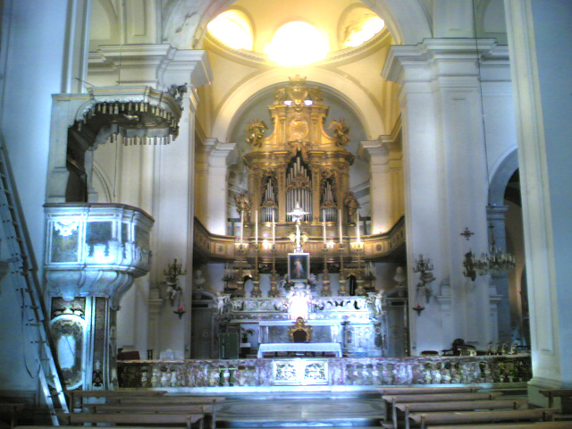 Scorcio dell'interno S. Giacomo degli Spagnoli, Napoli